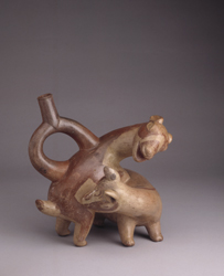 Cerámica Mochica con representación de llamas. Museo Larco.